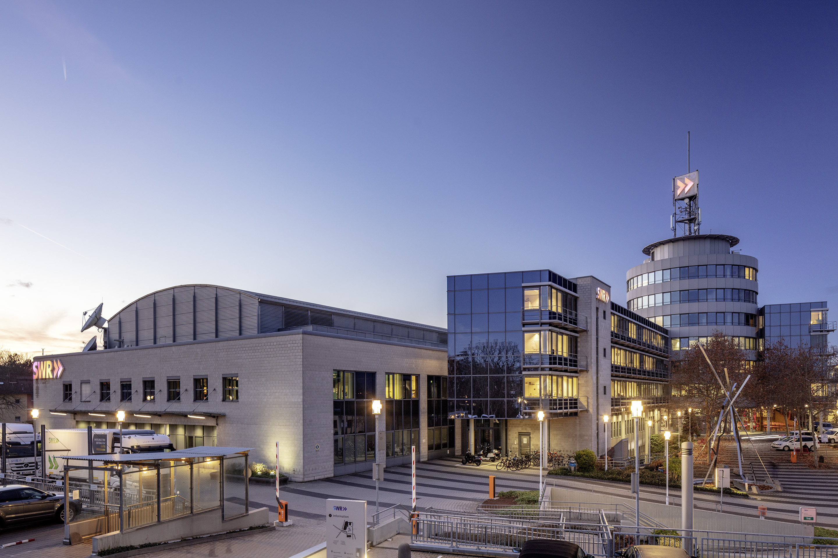 Gebäudekomplex des SWR-Funkhauses Mainz